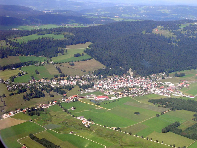 Les Ponts-de-Martel, seen from an airplane.